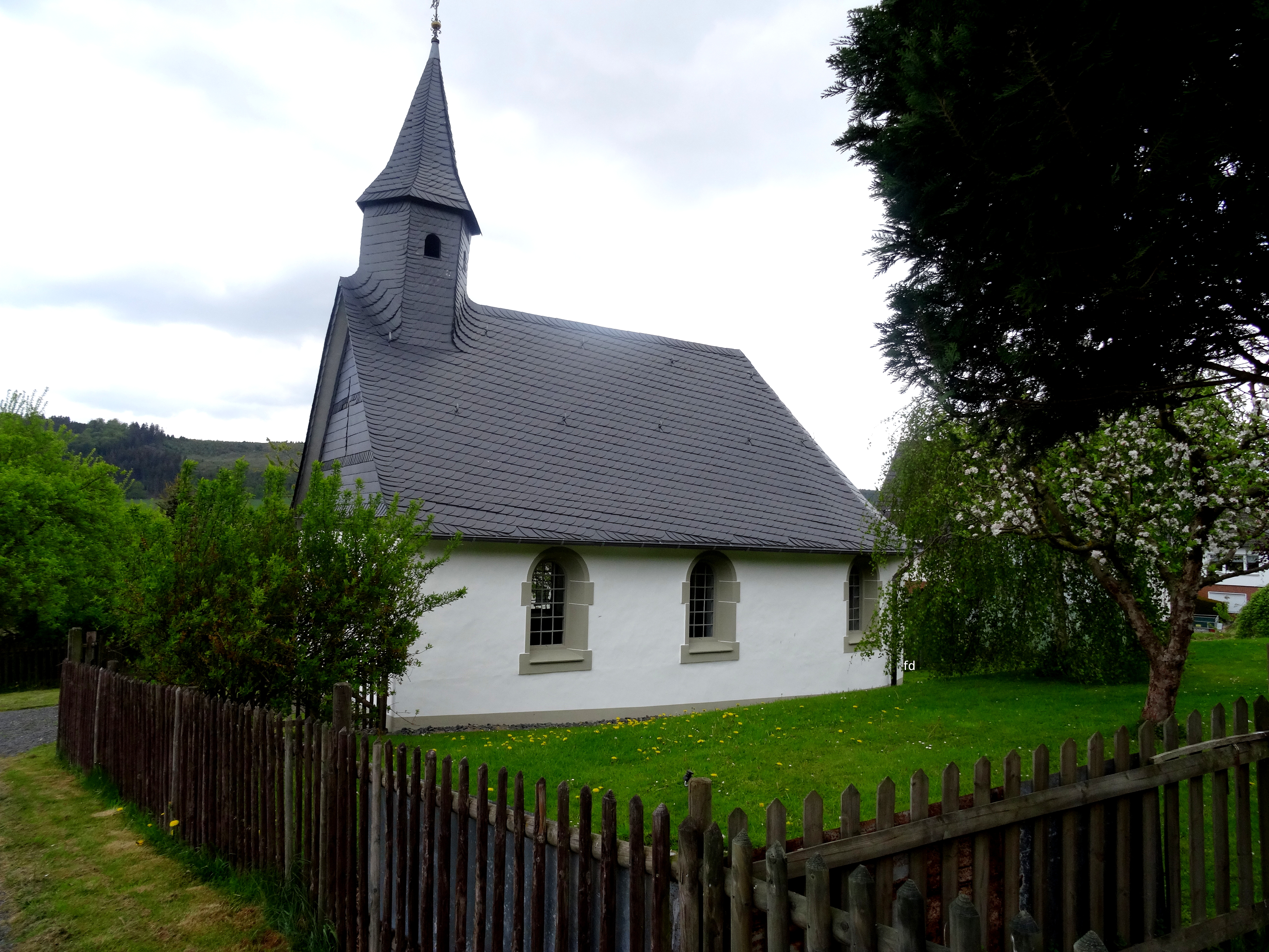 Kapelle St.Margaretha in Beisinghausen erbaut 1753